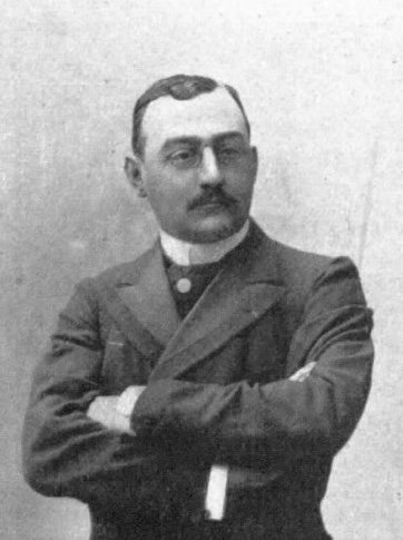 "Marcel Fournier, directeur-rédacteur en chef de la Revue politique et parlementaire".